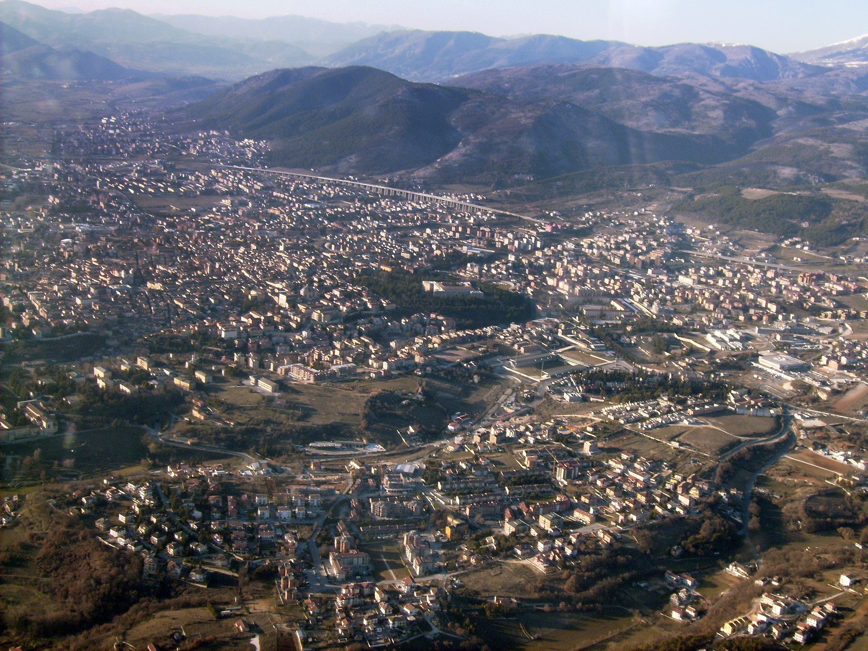 VIsta aerea della città dell'Aquila zona est-centro